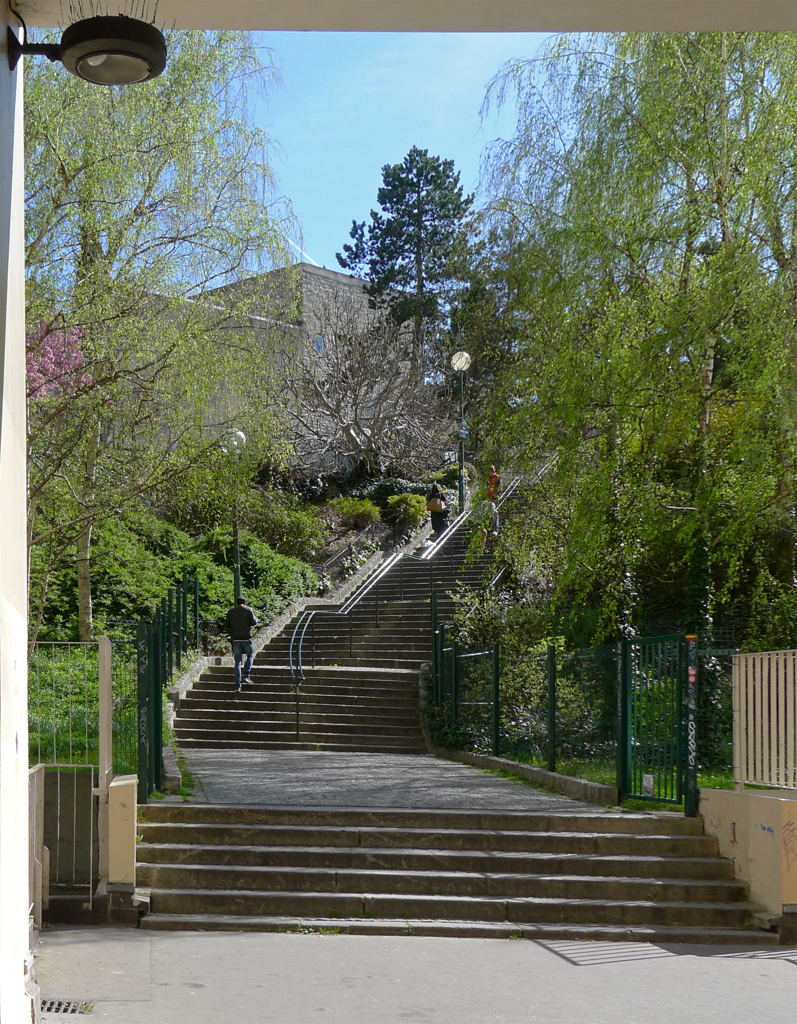 Rue Eugène-Atget - Paris XIII